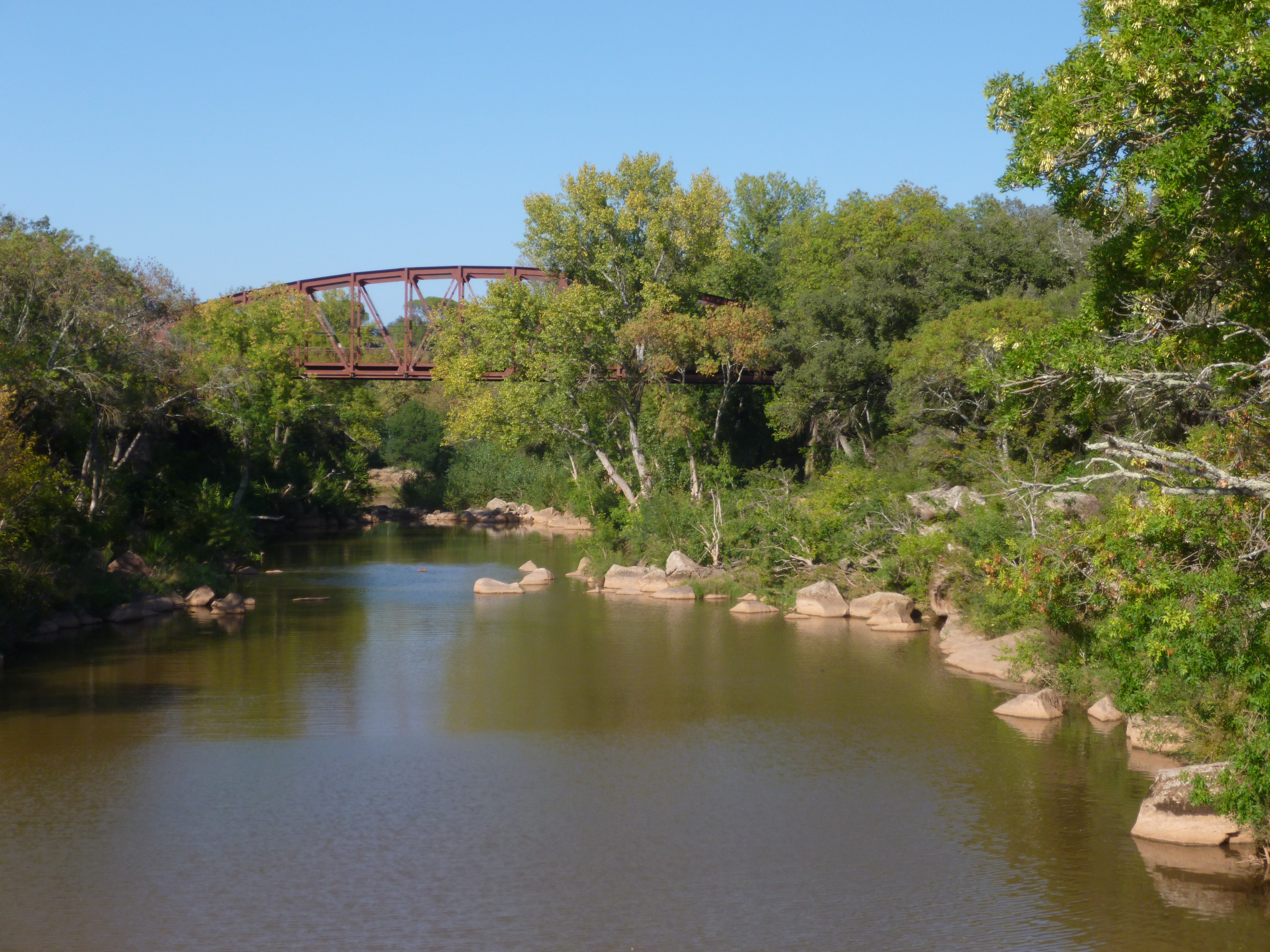 Photo prise à Vidauban (83), au sein de la Réserve Naturelle Nationale de la plaine des Maures.